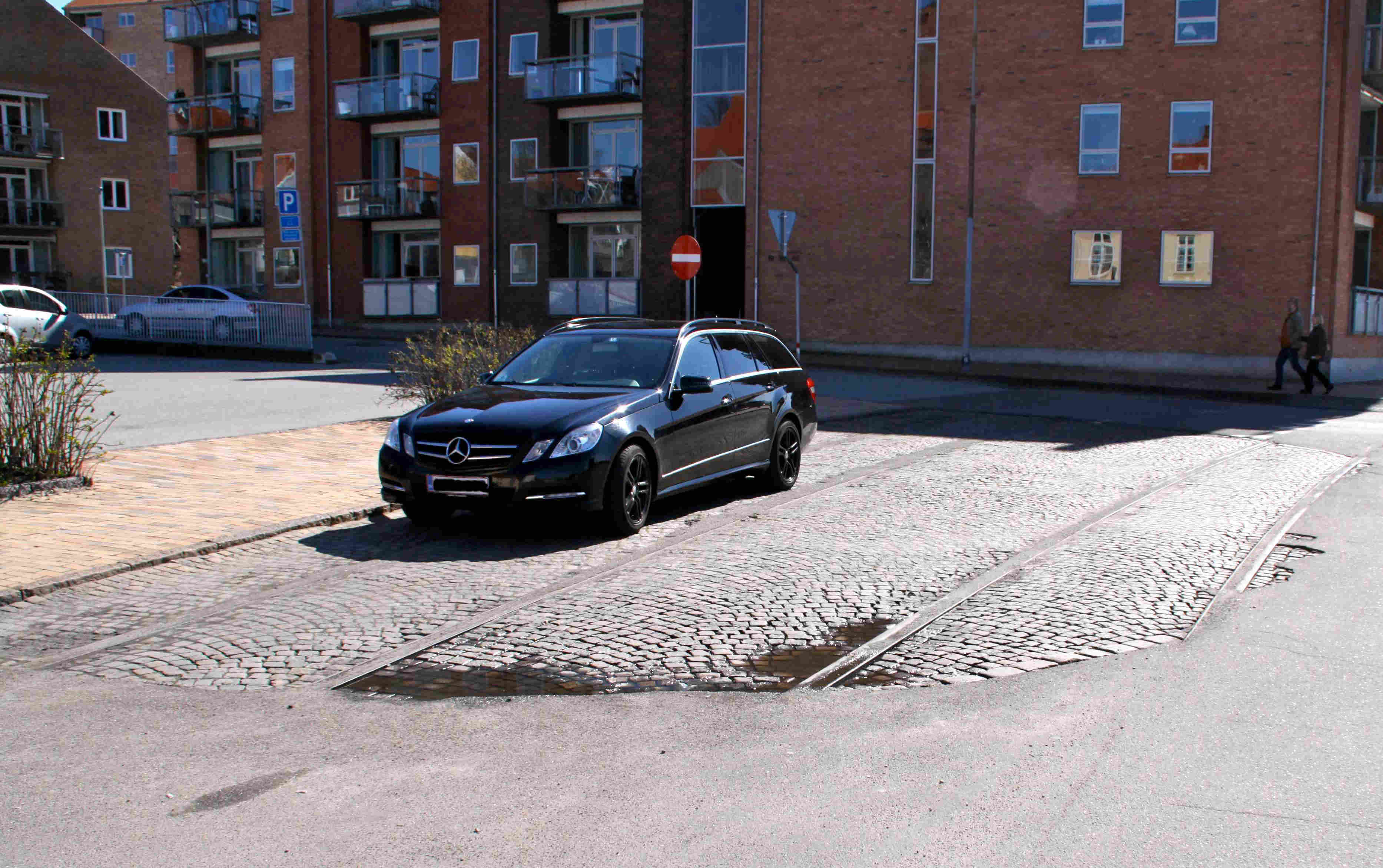 Gleisrest am Hafen von Sønderborg